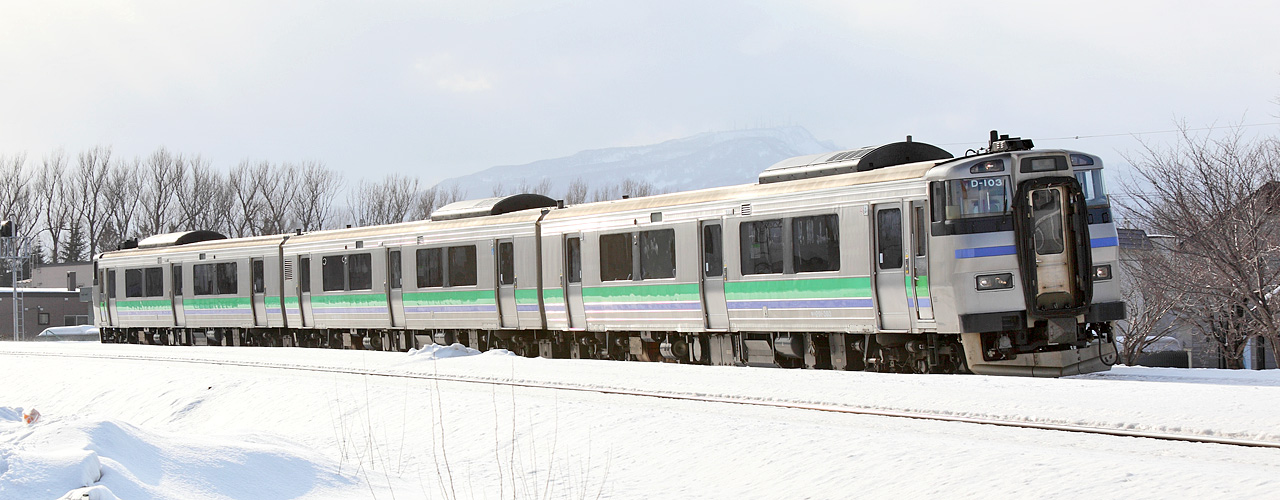 JR Hokkaido Kiha 201 series DMU ( Shin-kotoni Stn. - Taihei Stn. )